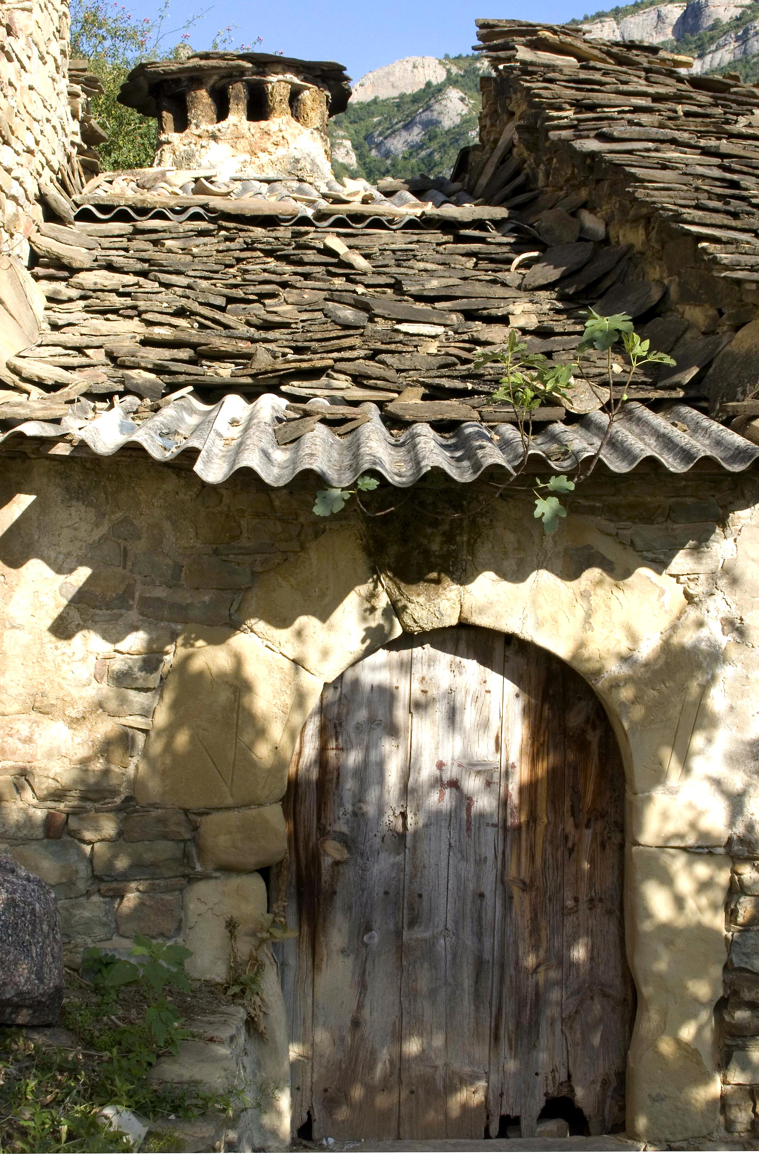 Situat a 925 metres d'altitud sobre el nivell del mar, el poble de Pardinella pertany al municipi de Beranui, a la Baixa Ribagorça.